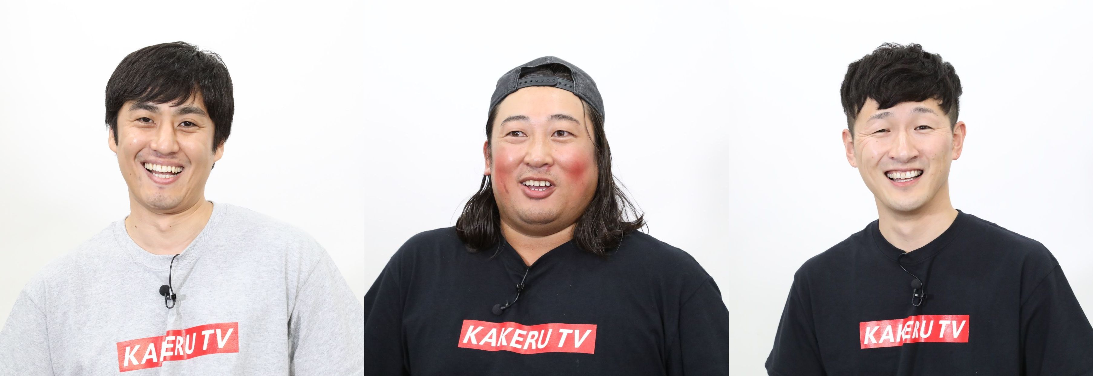 「ロバート」メンバー3人 Personality rights warningAlthough this work is freely licensed or in the public domain, the person(s) shown may have rights that legally restrict certain re-uses unless those depicted consent to such uses. In these cases, a model release or other evidence of consent could protect you from infringement claims.